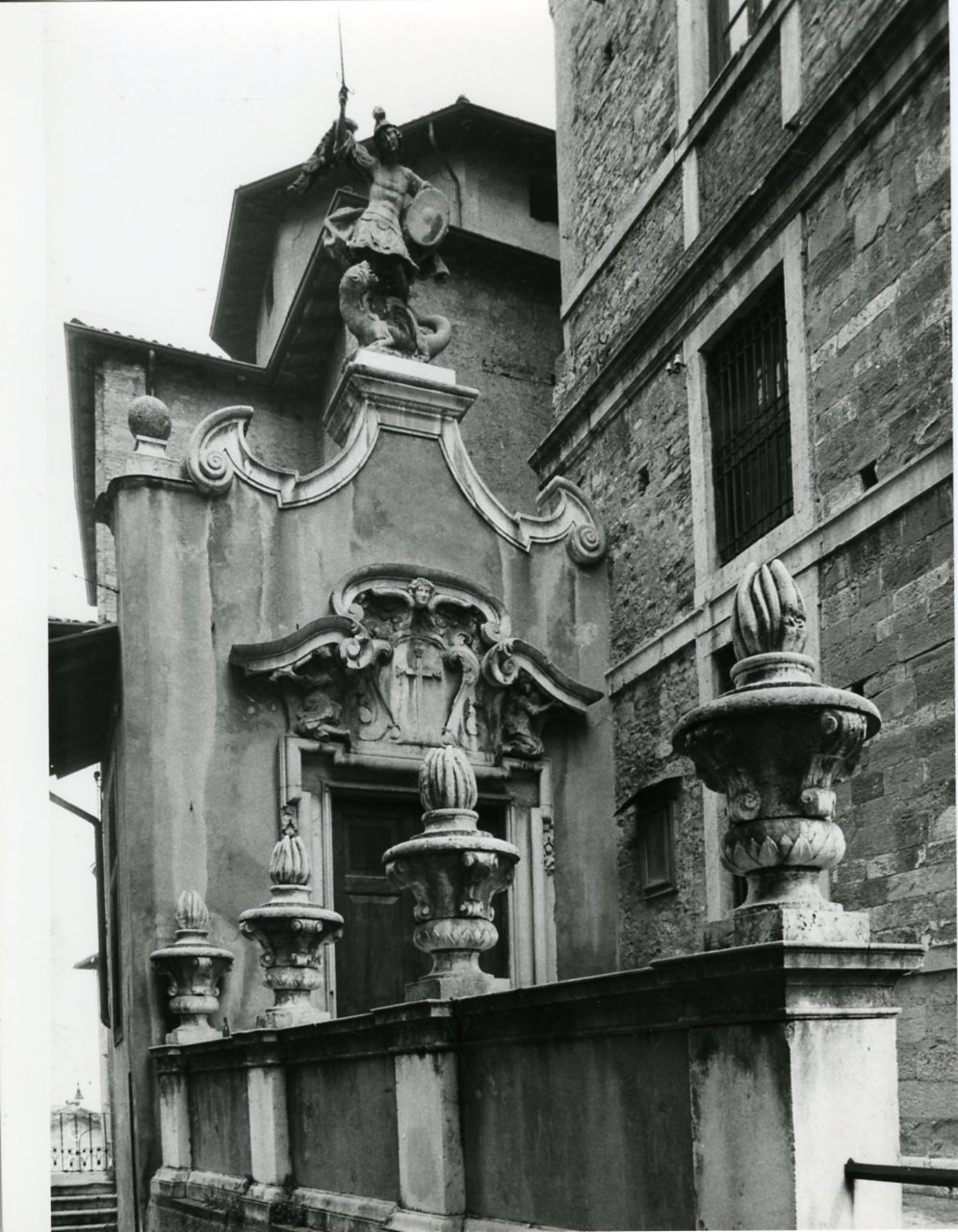 Servizio fotografico : Bergamo, 1981 / Paolo Monti. - Stampe: 17 : Positivo b/n, gelatina bromuro d'argento/ carta, 24x30. - ((Al verso delle stampe manoscritto numero di negativo corrispondente: 3459/34, 3501/38, 3597/9, 3597/26, 3602/13. Sul coperchio della scatola manoscritto a pennarello nero: "Bergamo/ Architettura". - Occasione: Documentazione per la pubblicazione: Fumagalli Alberto, "Bergamo: origini e vicende storiche del centro antico", Milano, Rusconi immagini, 1981. - Fonte: Agenda di Paolo Monti: Nikon Leika 3001-/ Monti 1978 (1978-1982), presso Archivio Paolo Monti. - Fonte: Monografia di Fumagalli, Alberto: Bergamo: origini e vicende storiche del centro antico (1981)